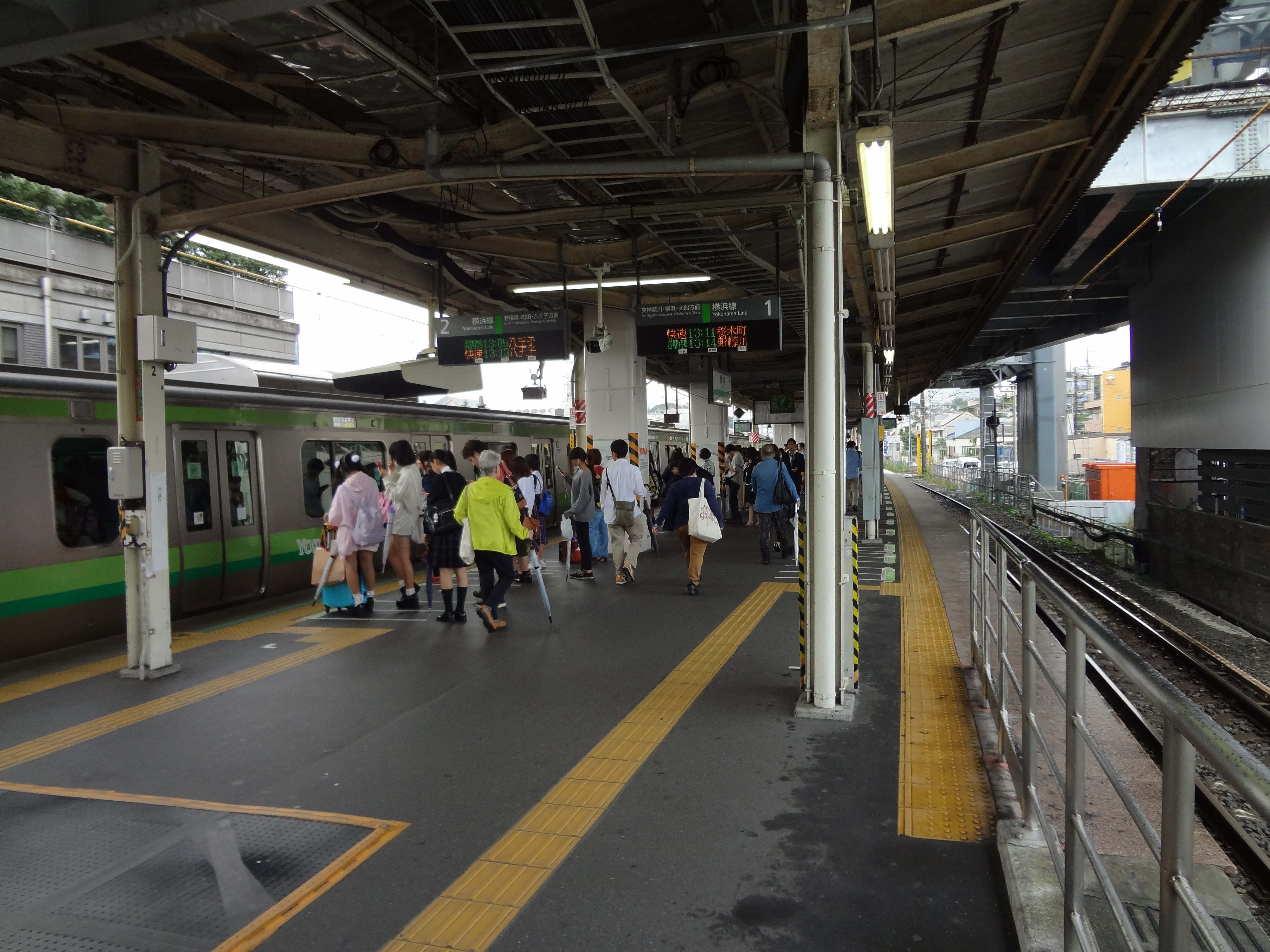 JR線ホーム